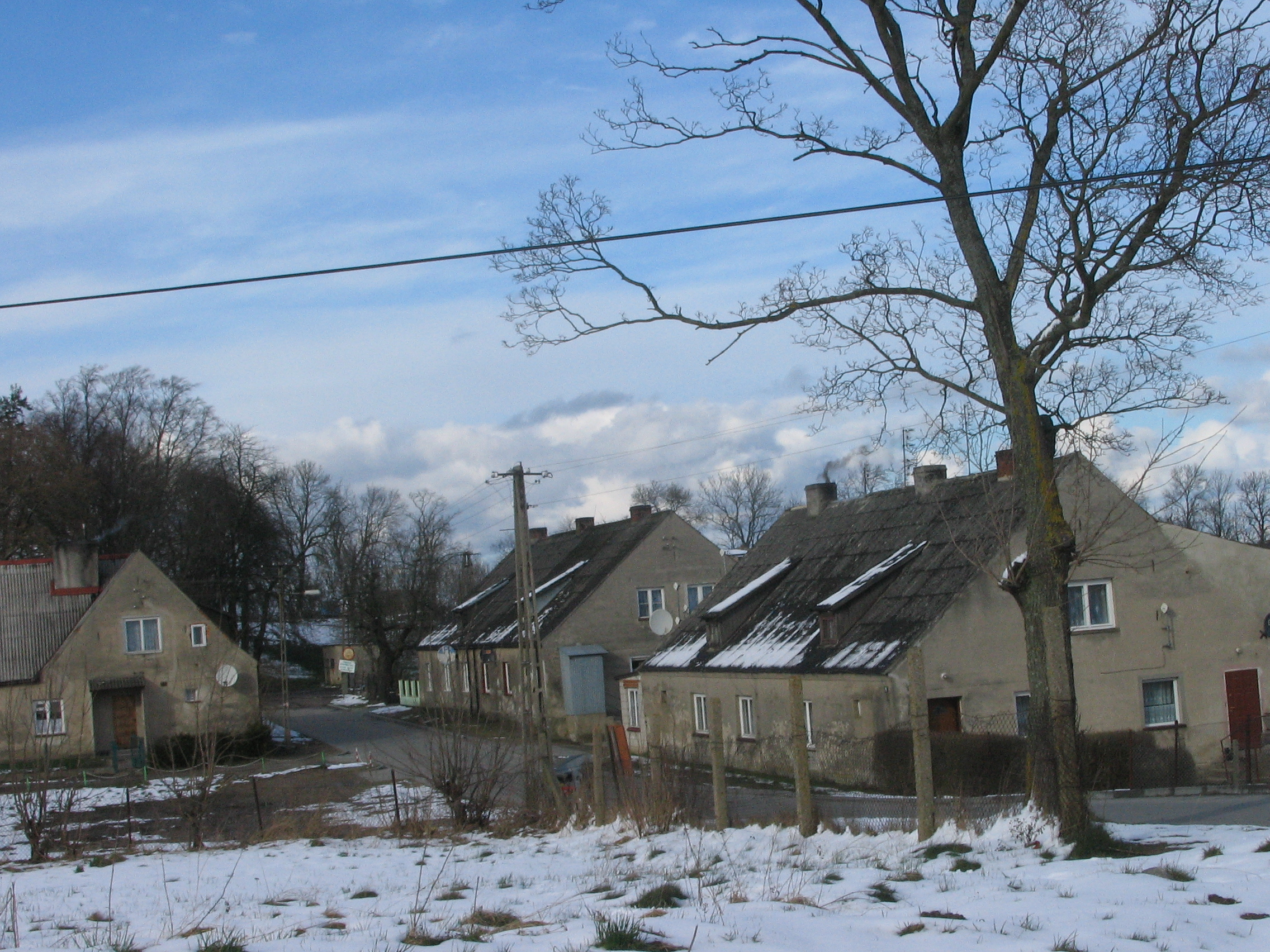 Sulicice - widok z szosy